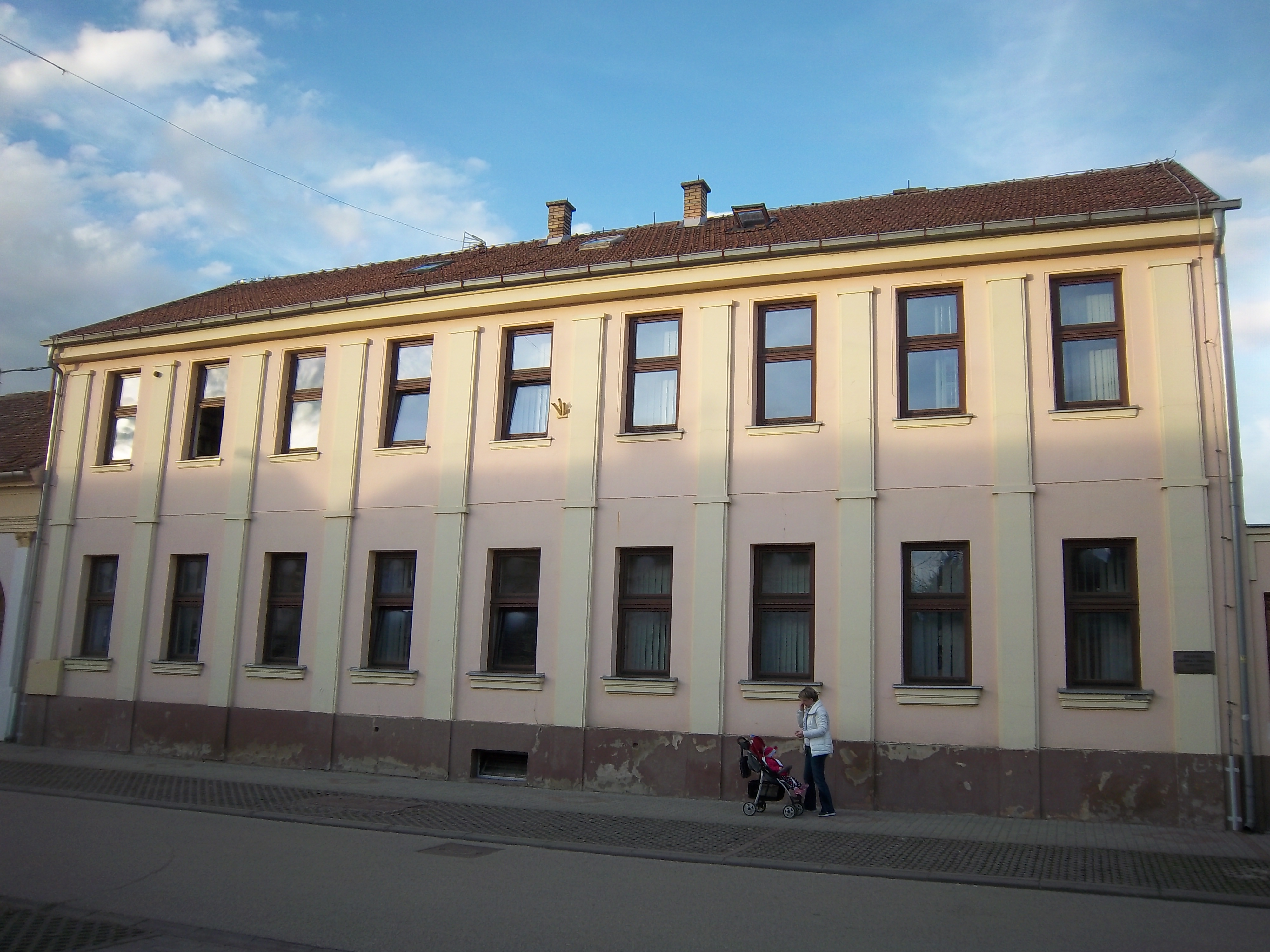 Srpskohrvatski / српскохрватски: Biblioteka u Vinkovcima.